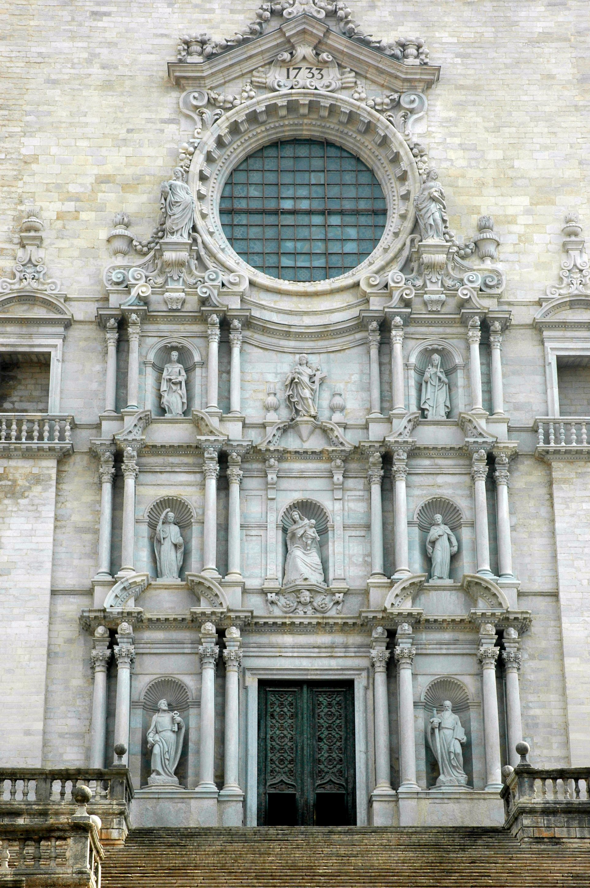 Catedral de Girona - Façana